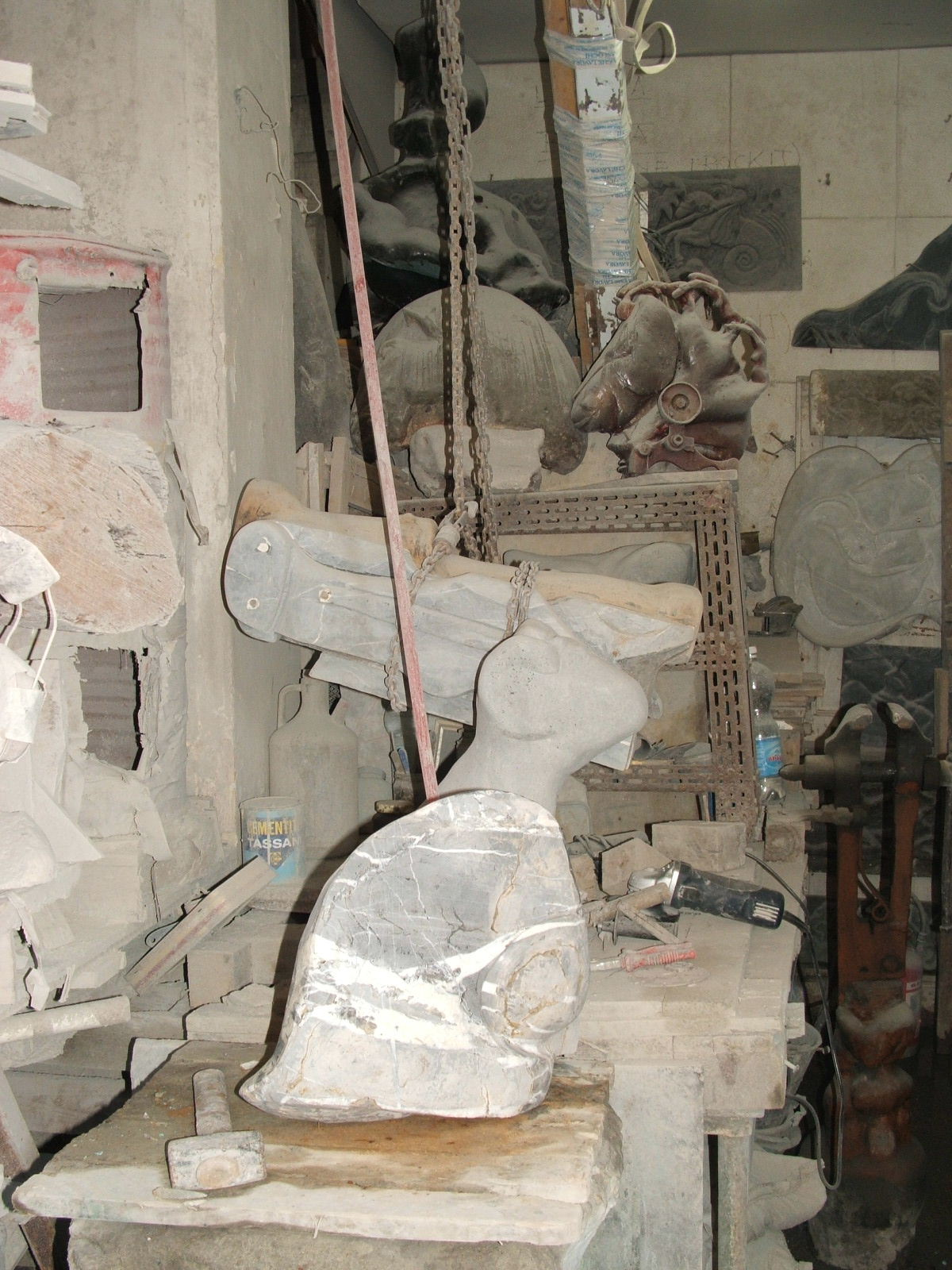 Genova, immagine dal laboratorio dello scultore genovese Alfonso Gialdini Laboratorio dello scultore